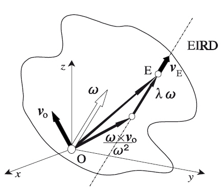 Cinemática del Sólido Rígido.jpg